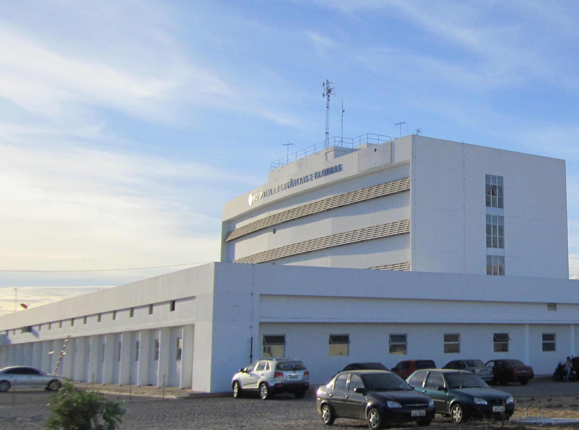 Hospital de Urgências e Traumas - Petrolina, Pernambuco, Brasil